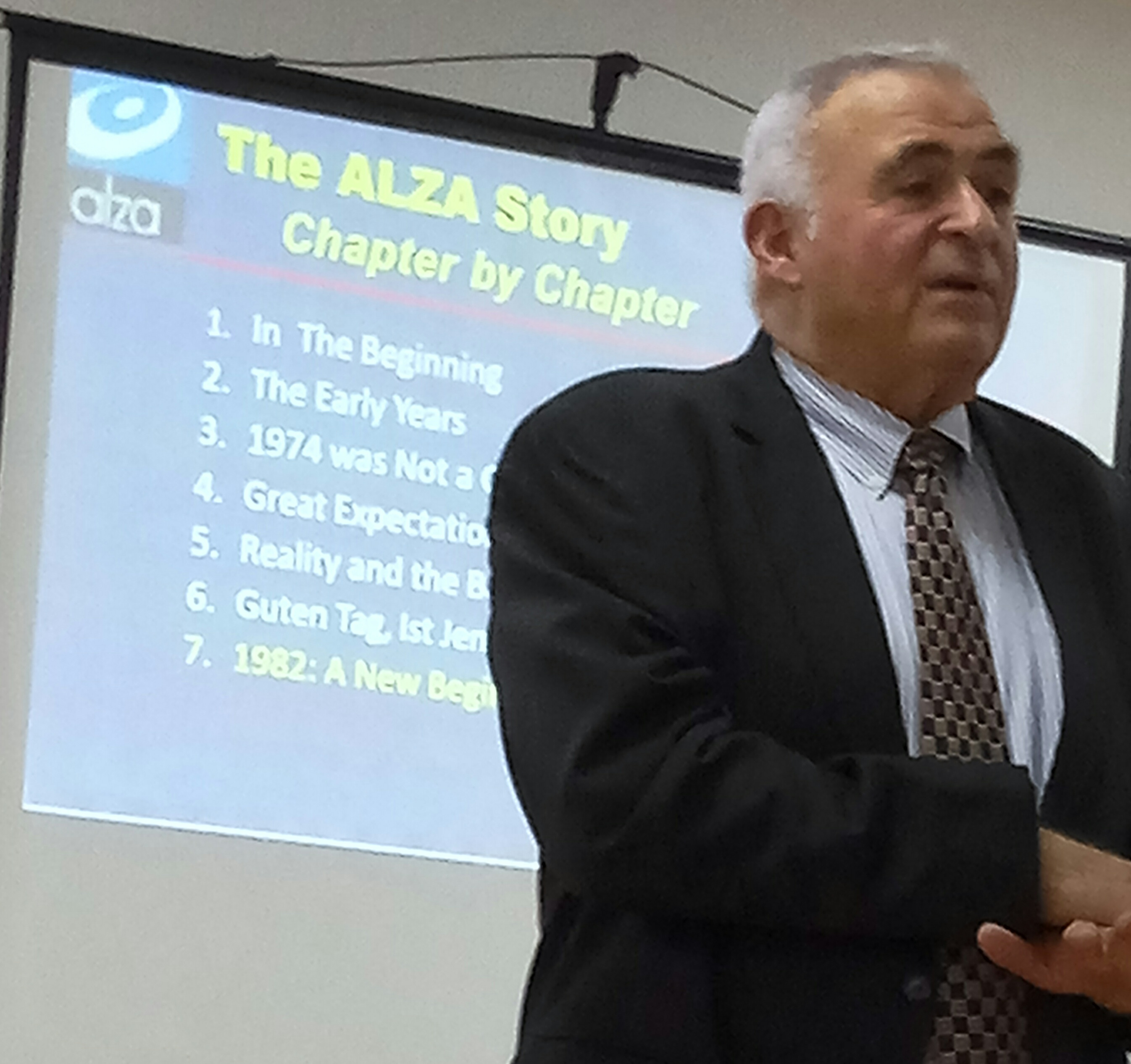 Martin Gerstel